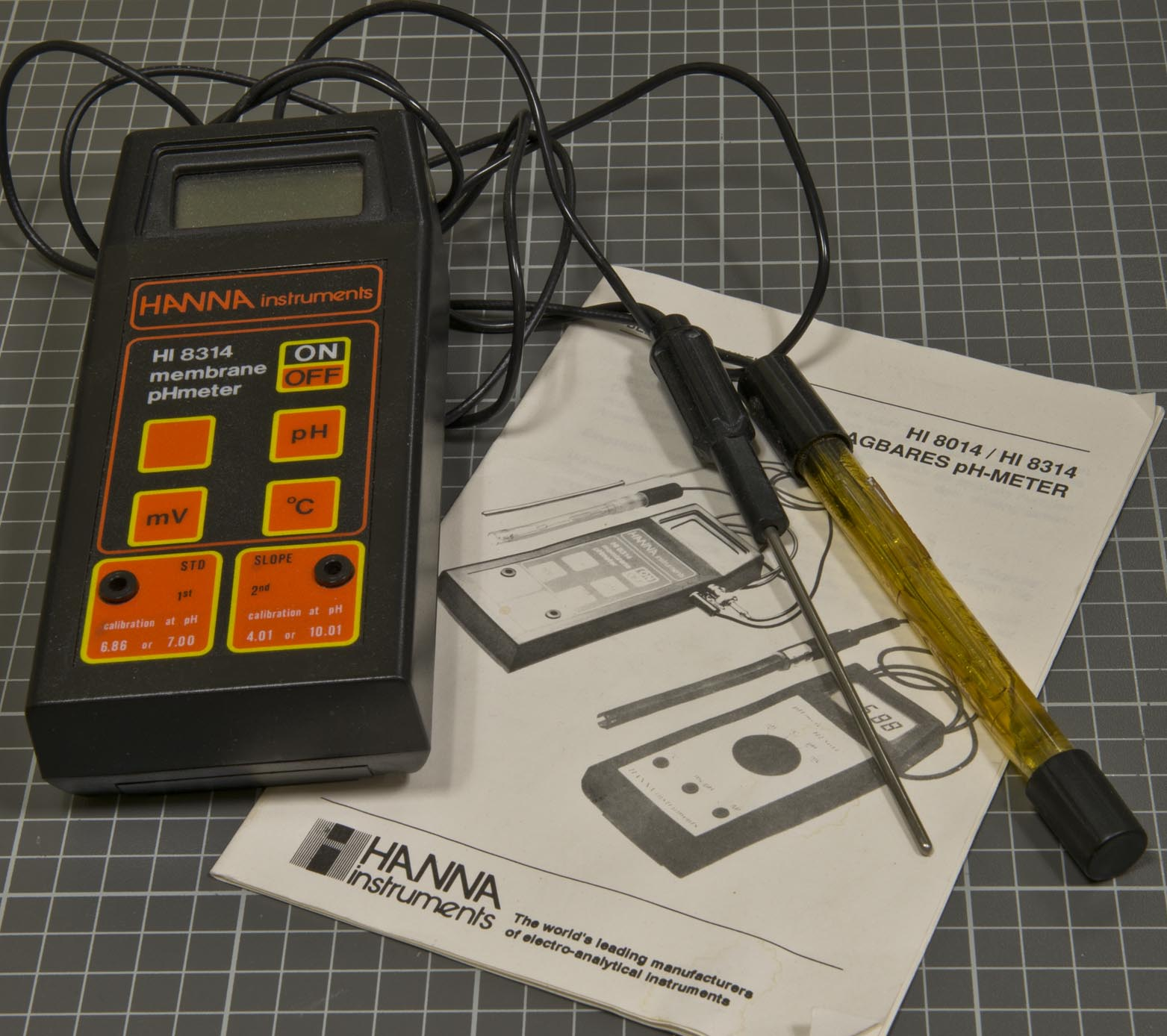 ph-meter